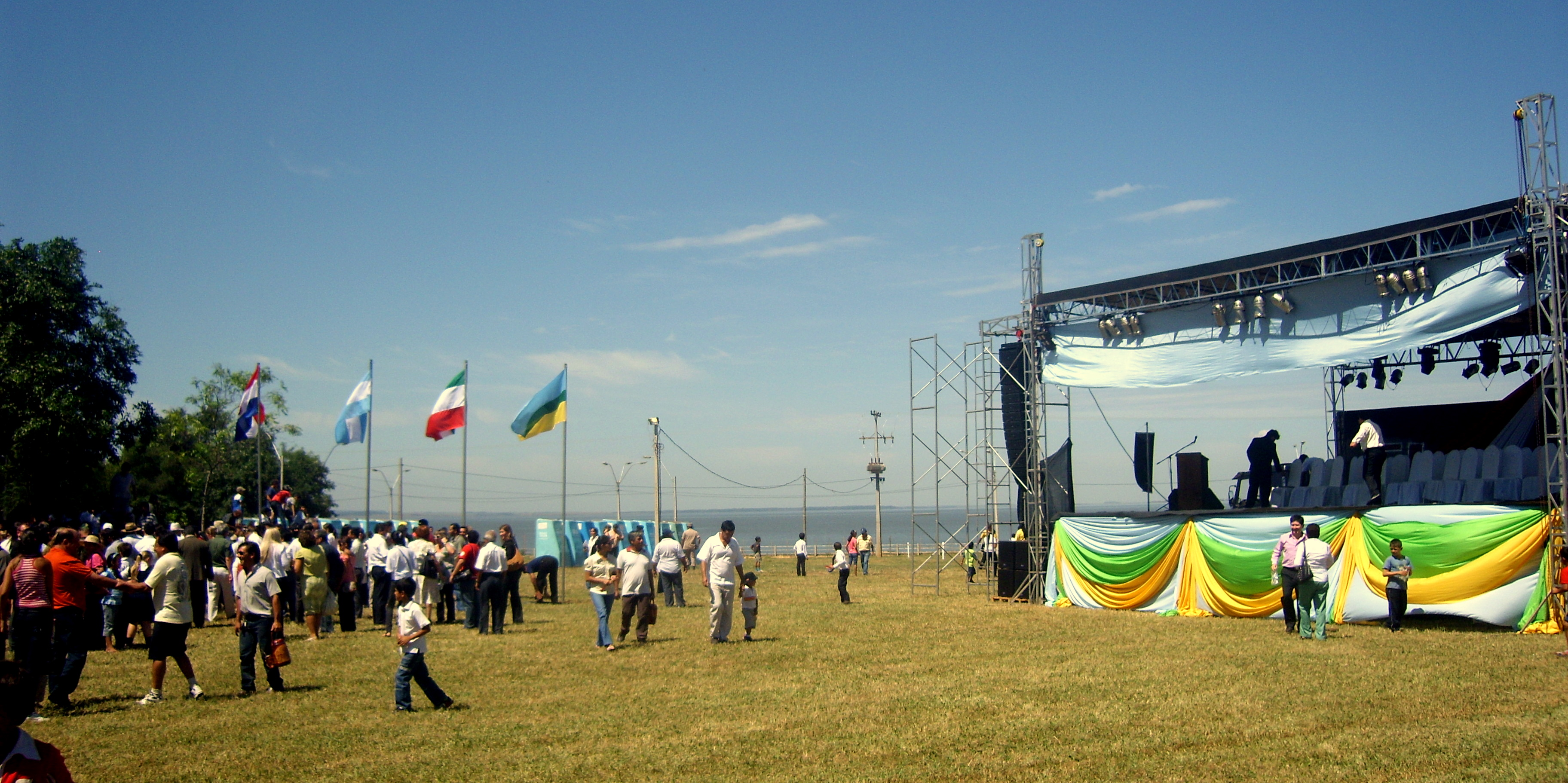 Acto central de los festejos del Bicentenario de la Batalla de Tacuary (Carmen del Paraná)